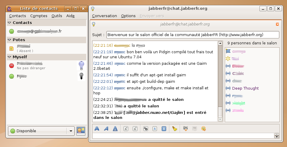 Pidgin 2.0, roster et fenêtre de chat